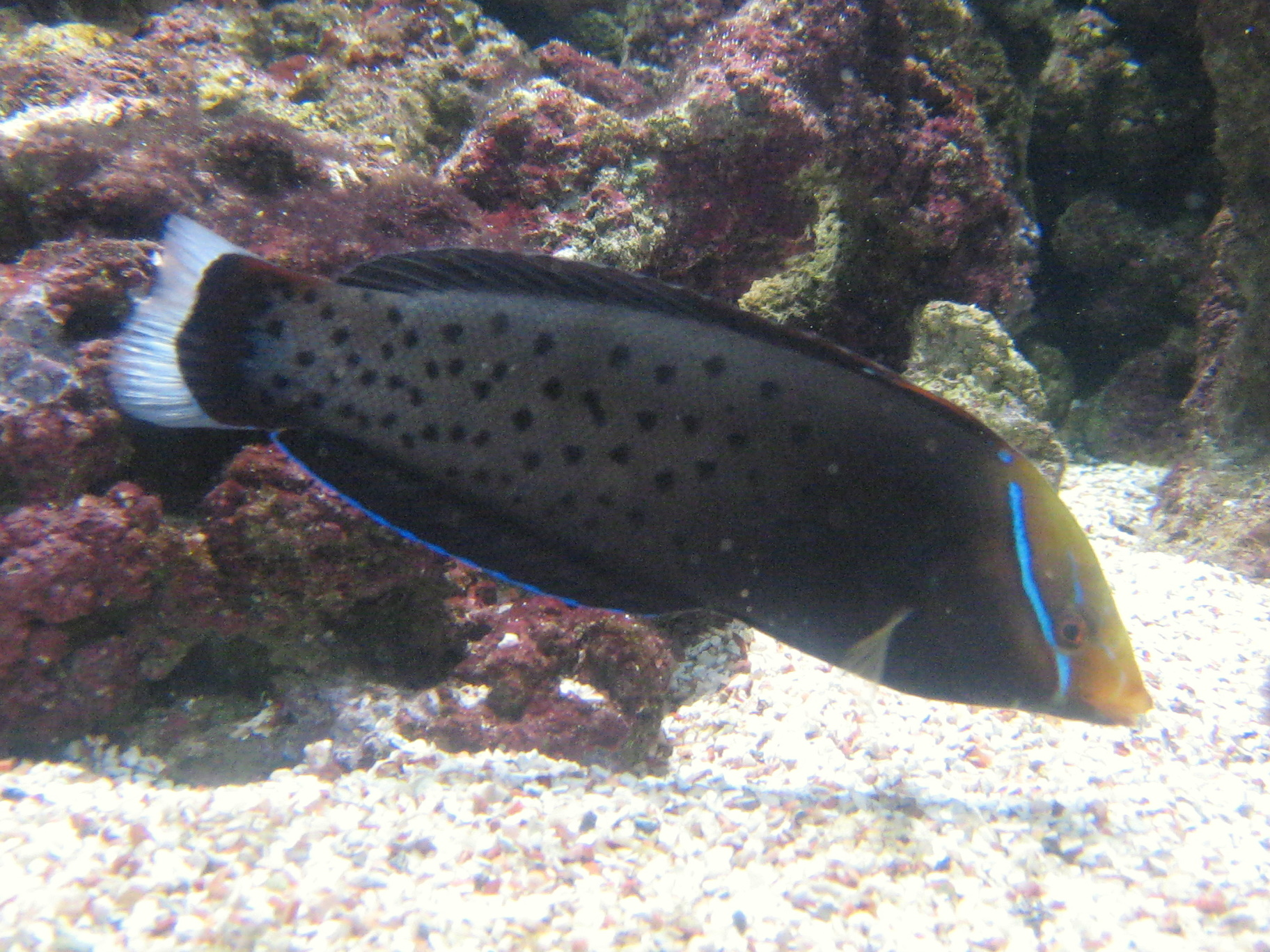 Coris formosa à l'aquarium Cinéaqua